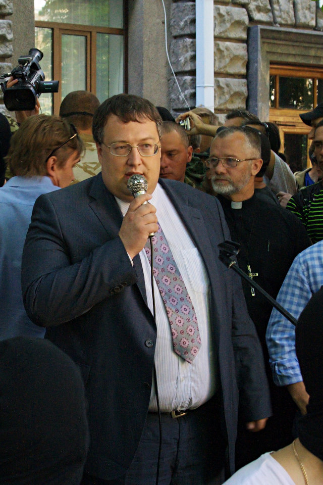 Радник міністра внутрішніх справ України Антон Геращенко на мітингові батальйону «Донбас» під Адміністрацією Президента 29 червня 2014 року